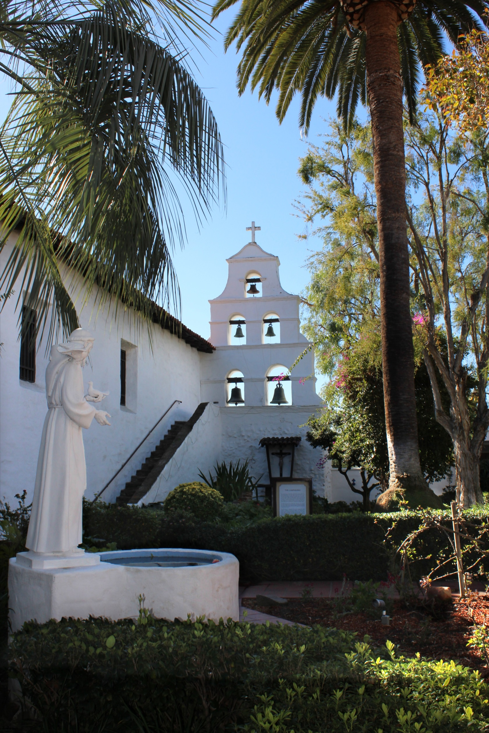 San Diego, CA USA - Mission San Diego de Alcala * 1769 *